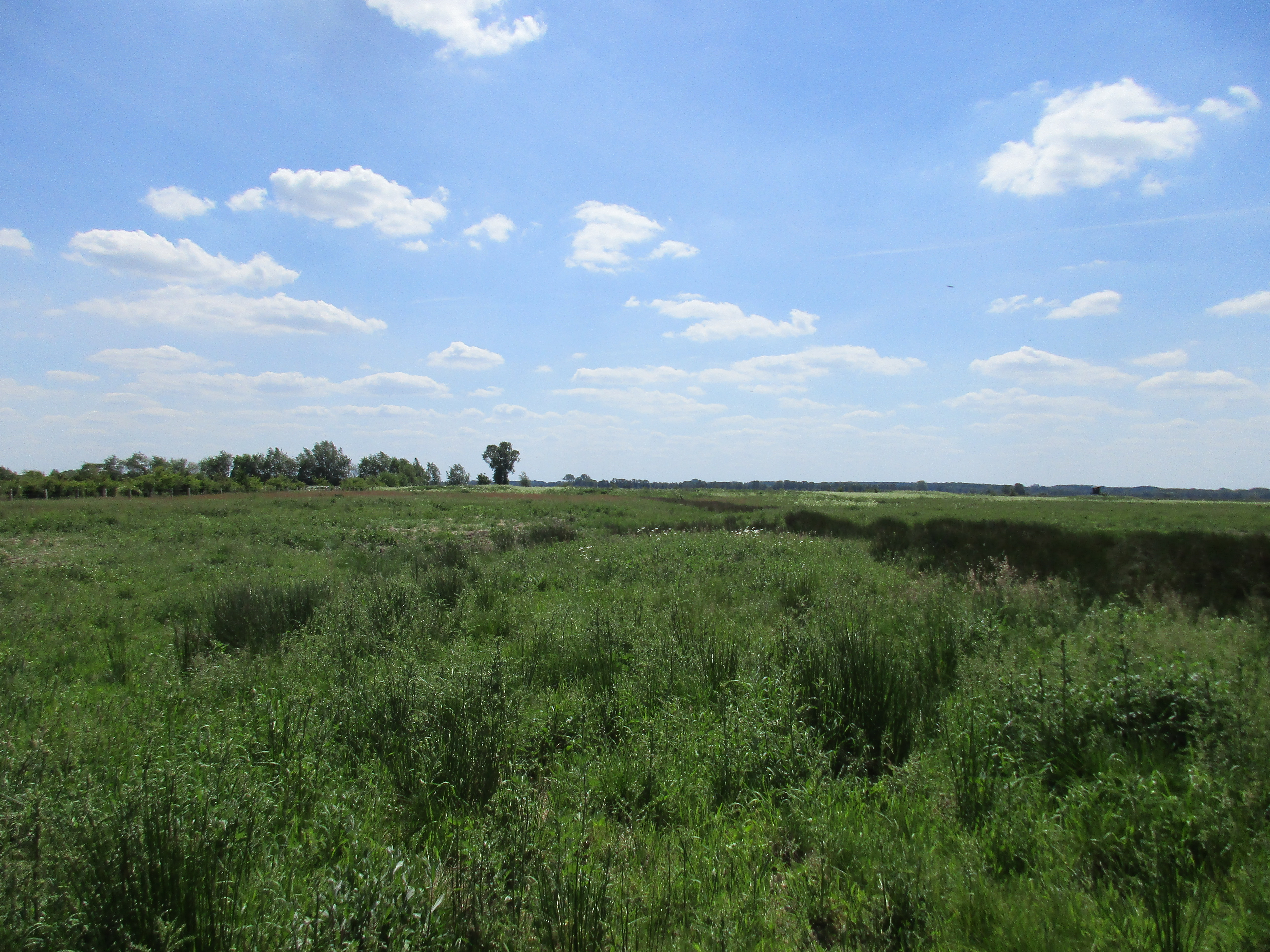 NSG Boller Moor und Lange Lohe